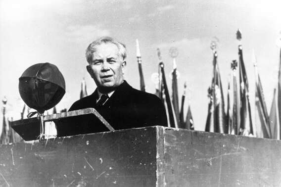 Ivar Lo-Johansson som 1 maj-talare på Gärdet, 1956.